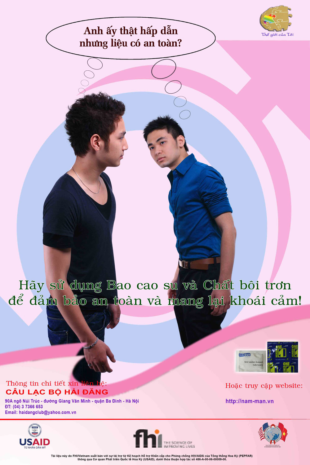 Áp phích cổ động "Tình dục an toàn" của Cơ quan Phát triển Quốc tế Hoa Kỳ (United States Agency for International Development - USAID)